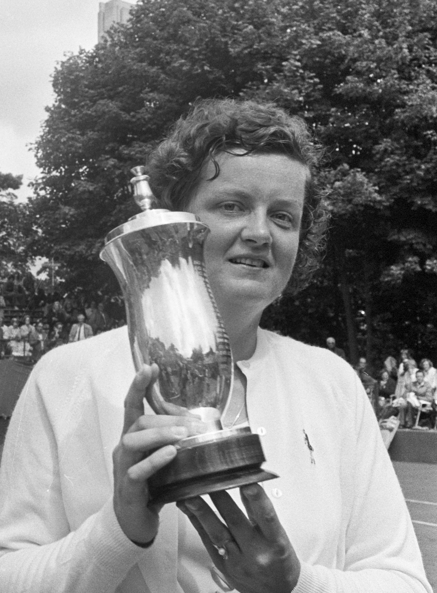 Internationale Tenniskampioenschappen, Melkhuisje, Betty Stove met de beker